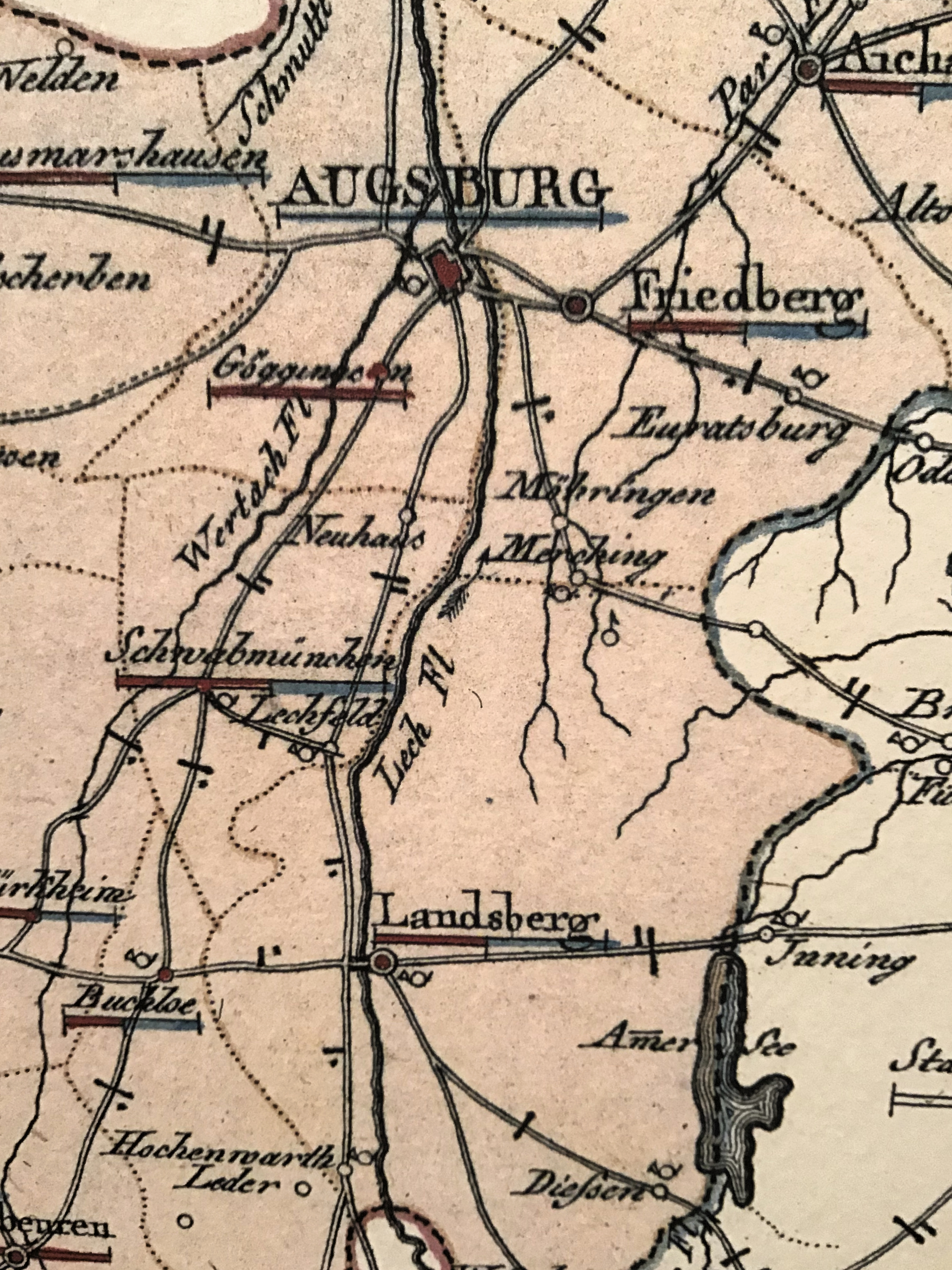 Kopien des Buchs "Das Königreich Bayern in fünfzehen Kreise eingetheilt", von 1809. Originalausgabe von 1809 BSB München, Signatur: Mapp. XI 50